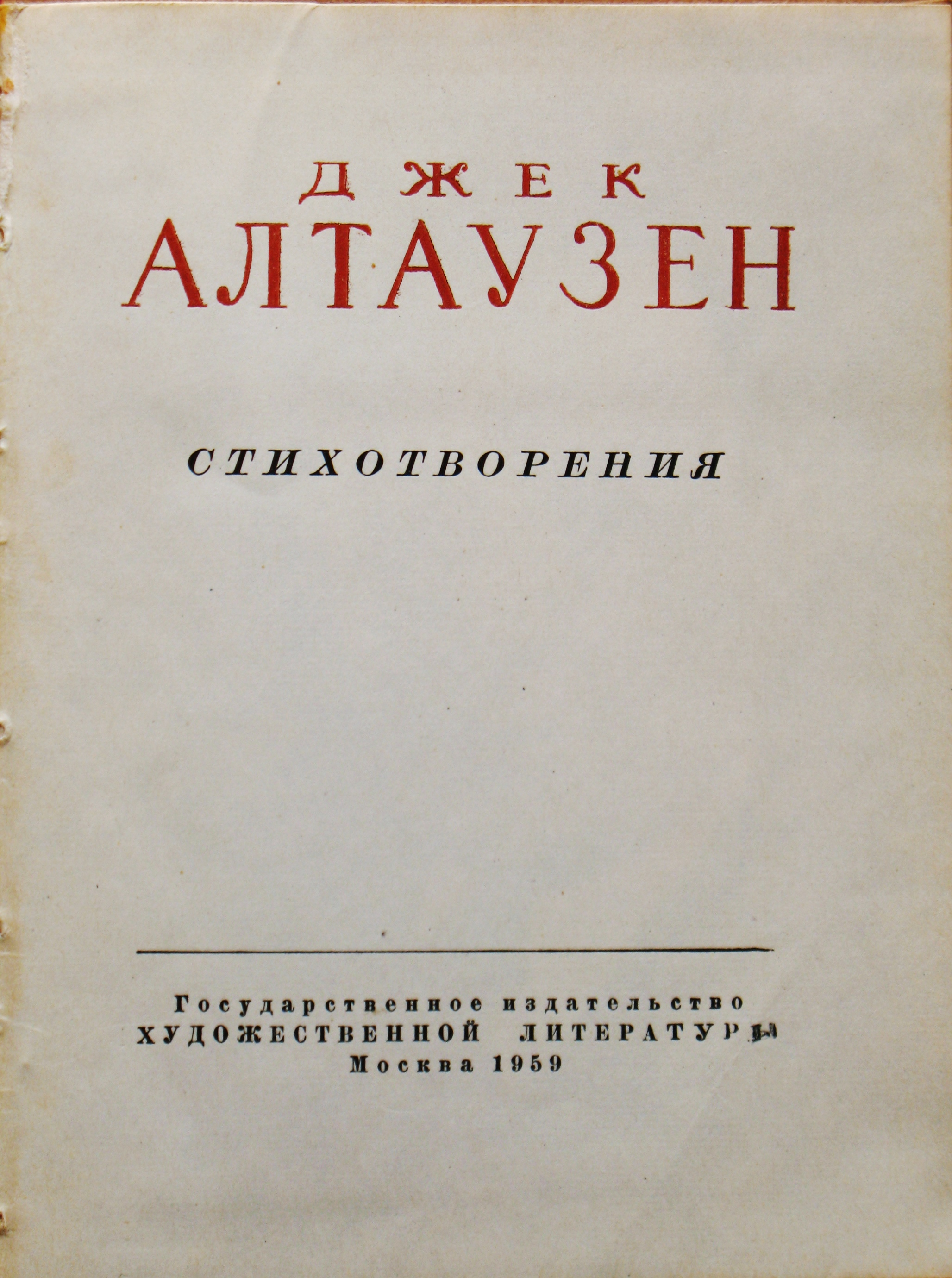 Soviet poet Jack Altauzen (dead in 1942) book.